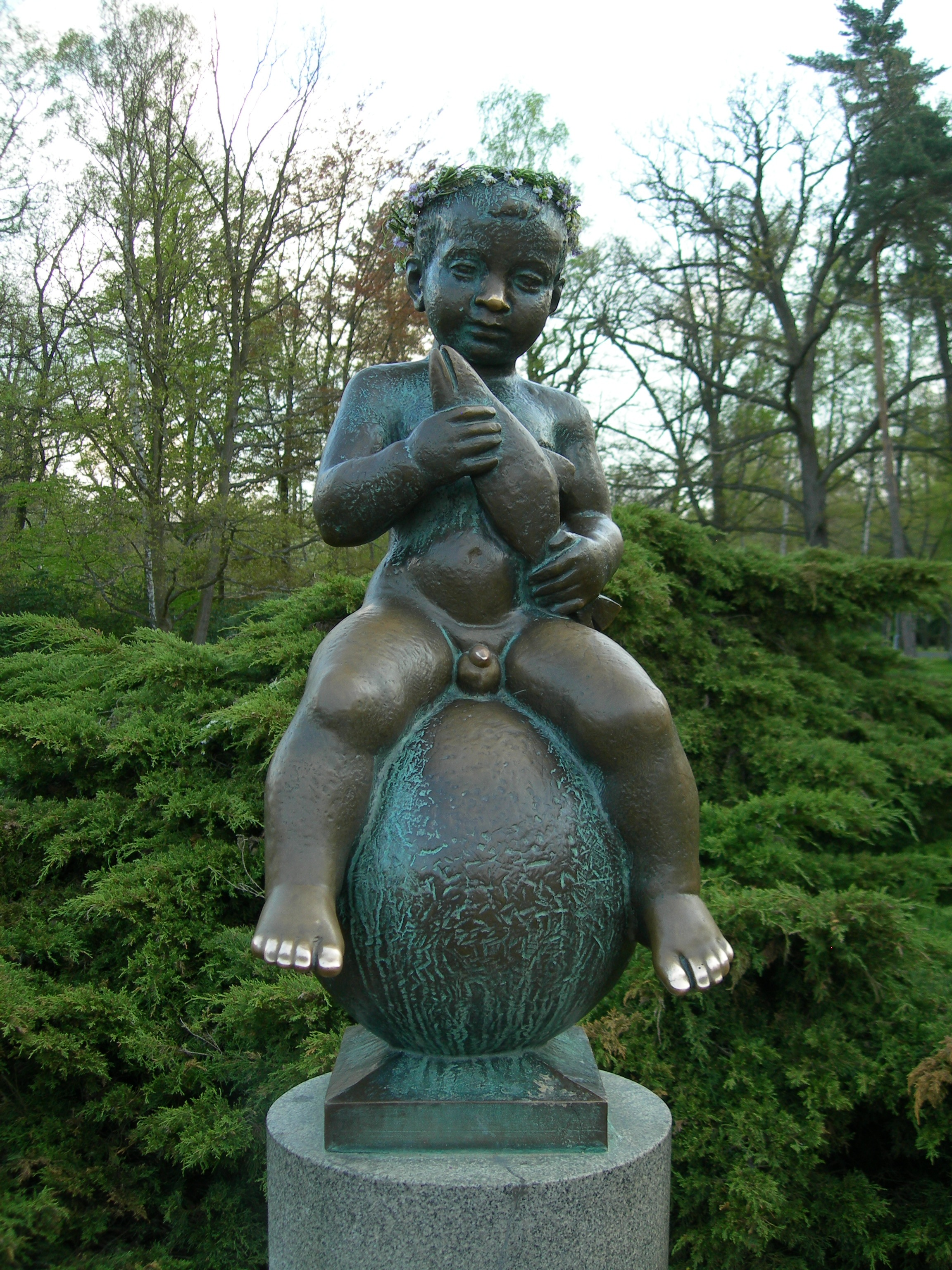 Socha František, nám. Míru, Františkovy Lázně